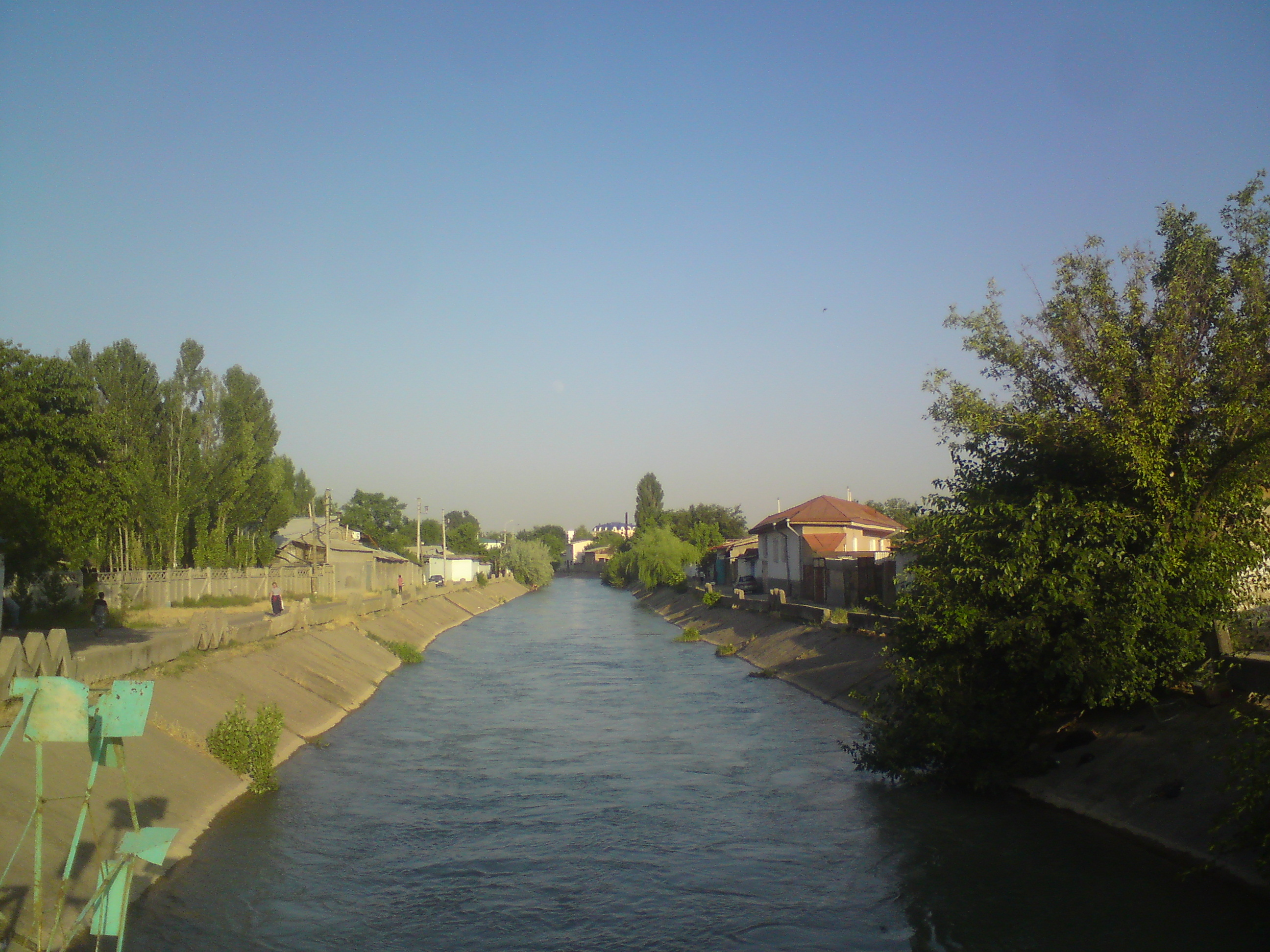 Канал Калькауз недалеко от улицы Гафура Гуляма, город Ташкент